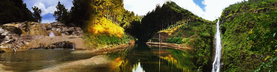 Beberapa potensi wisata alam Kabupaten Nganjuk